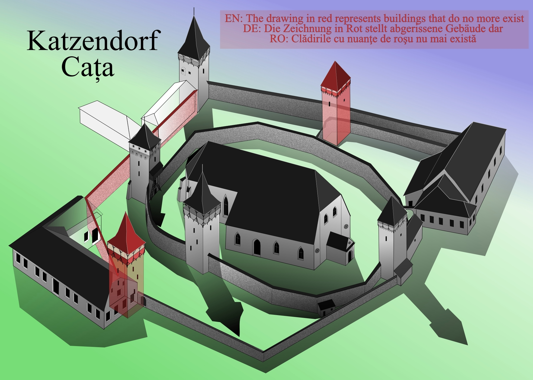 Color, Biserica fortificata din Cata.